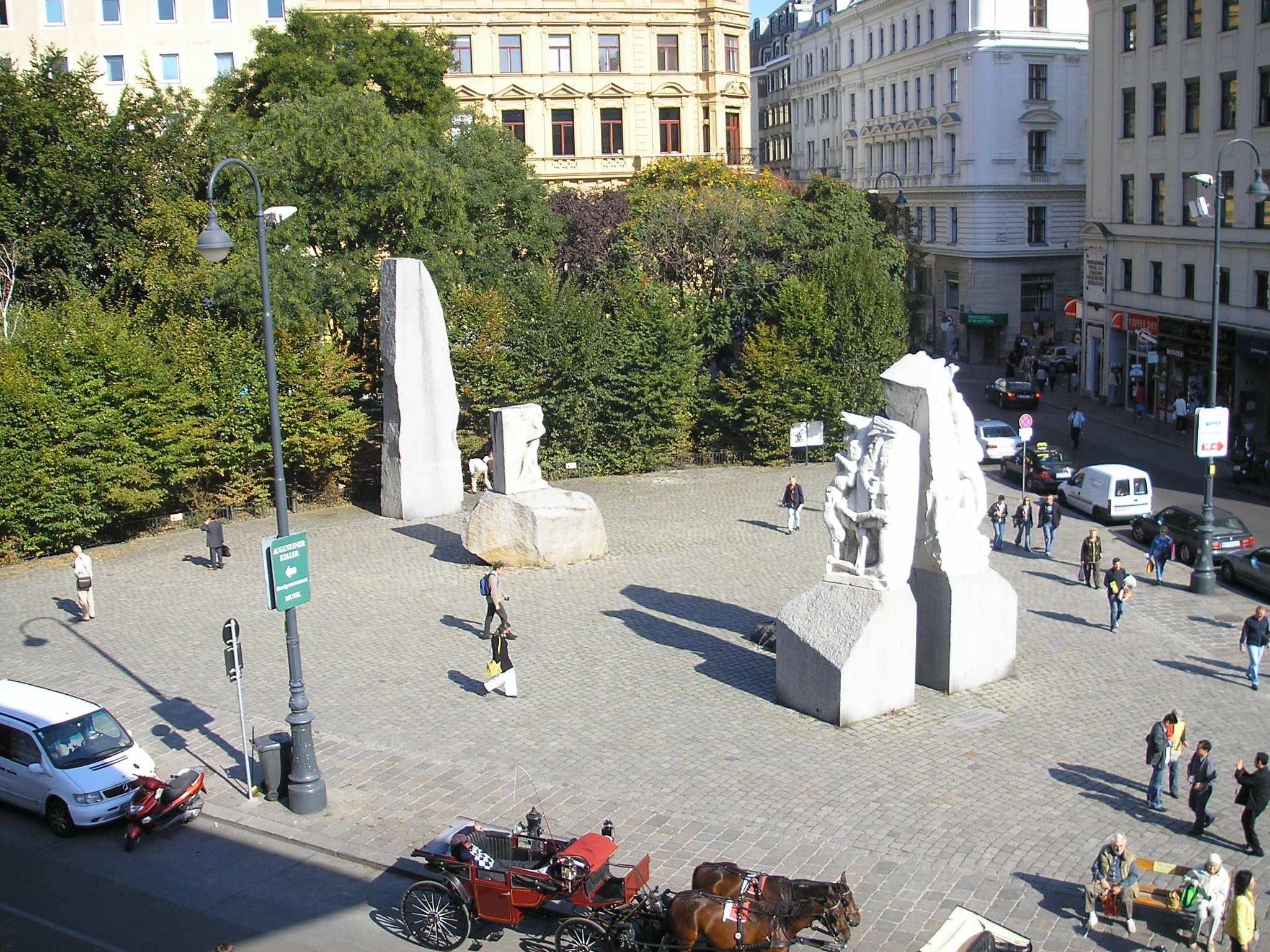 Mahnmal gegen Krieg und Faschismus (Monument against War and Fascism) in Vienna, Austria. Constructed by Alfred Hrdlicka.